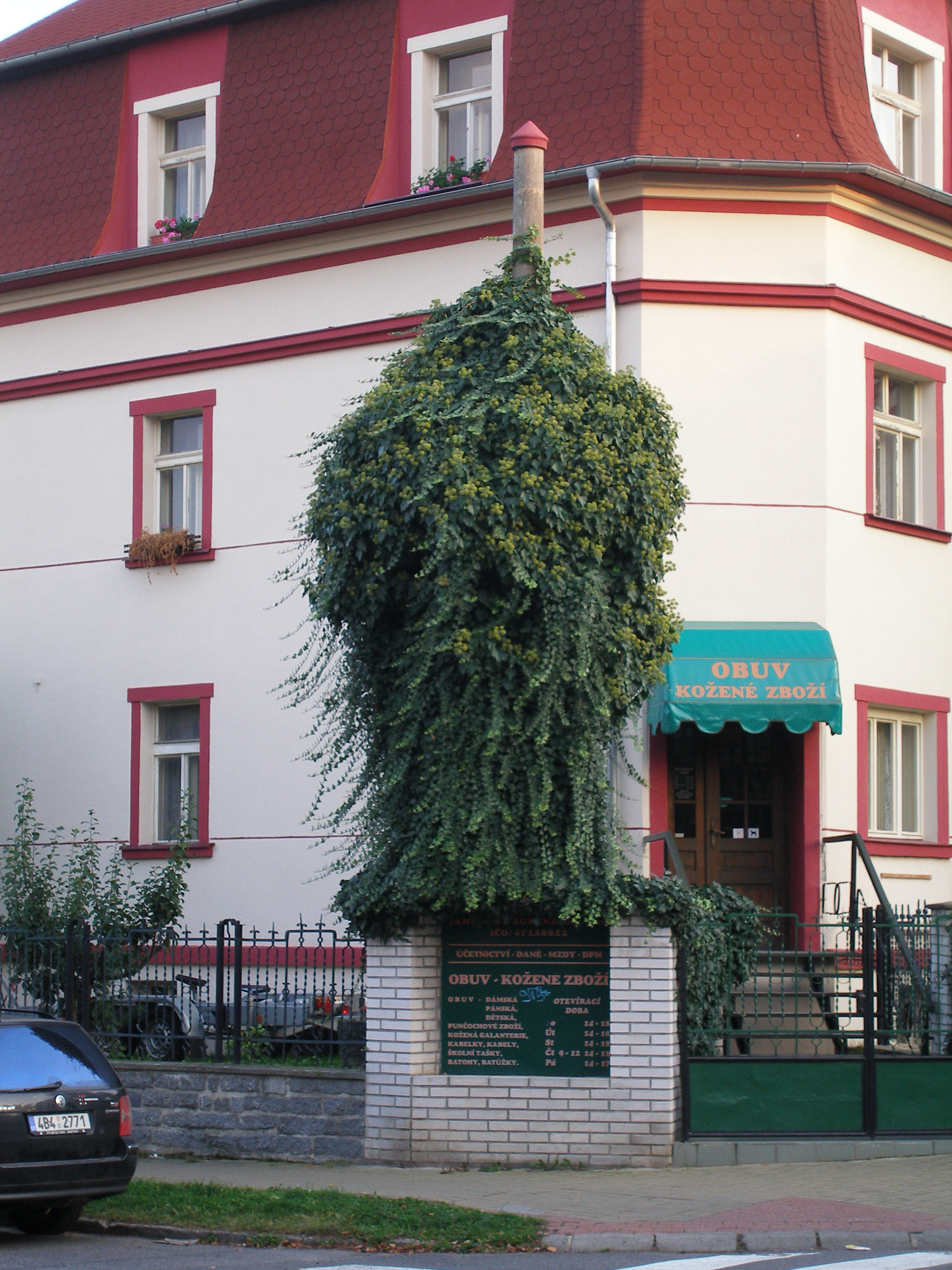 Sloup trolejbusového trolejového vedení v pražských Letňanech (Rychnovská 74, nároží ul. Tvrdého).